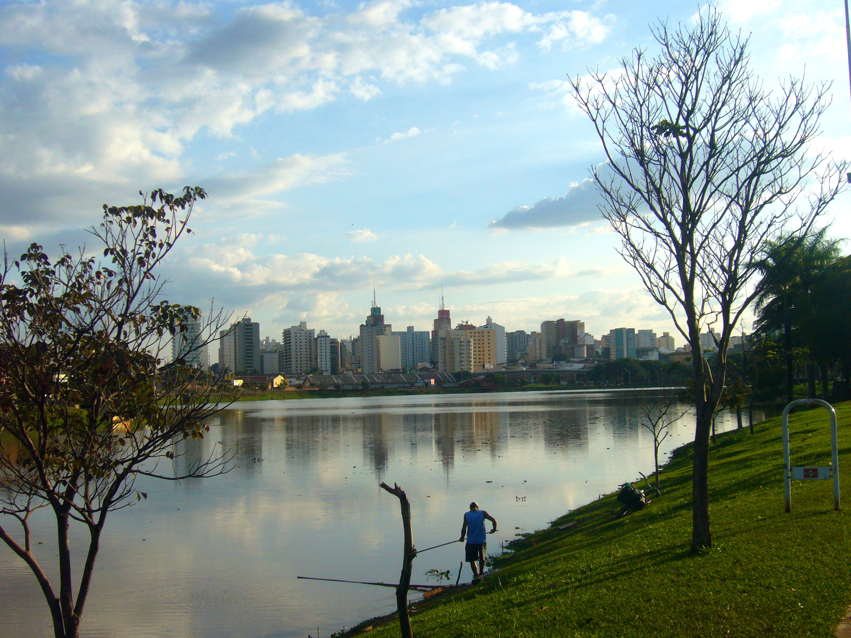 Vista da Cidade a partir da Represa Municipal de São José do Rio Preto - SP, BRASIL